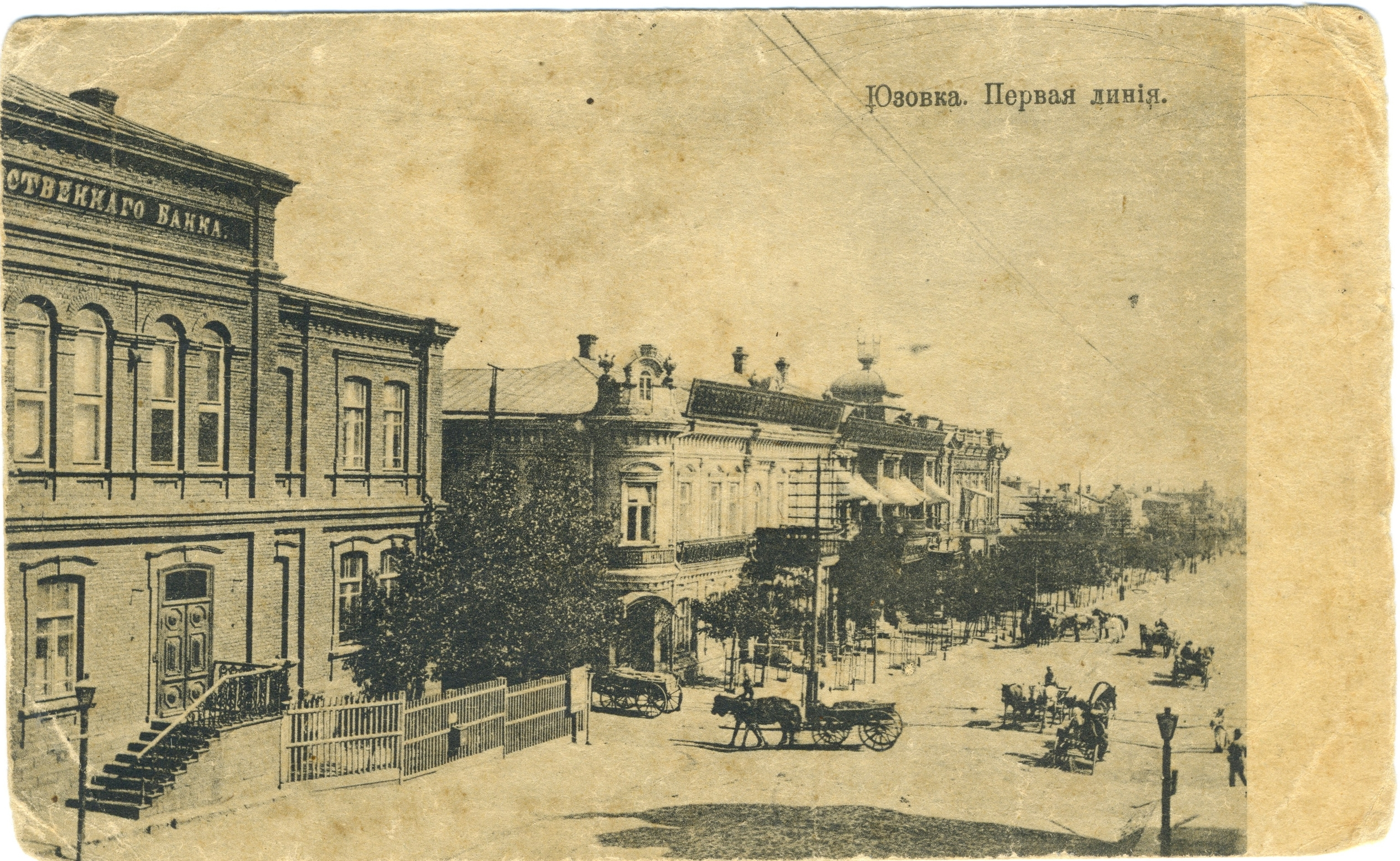 Первая линия, здание Государственного банка